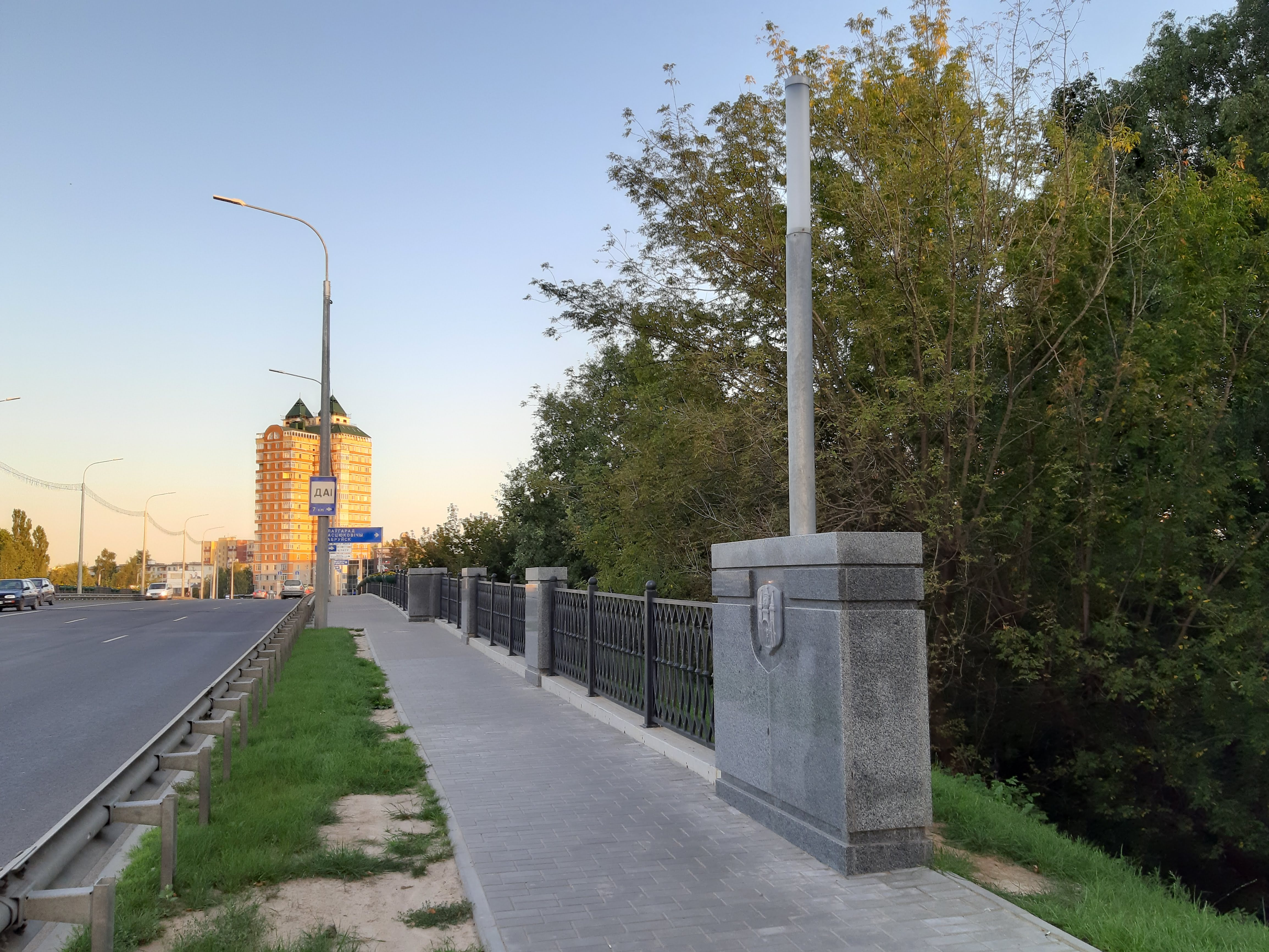 Магілёў. Па вул. Якубоўскага